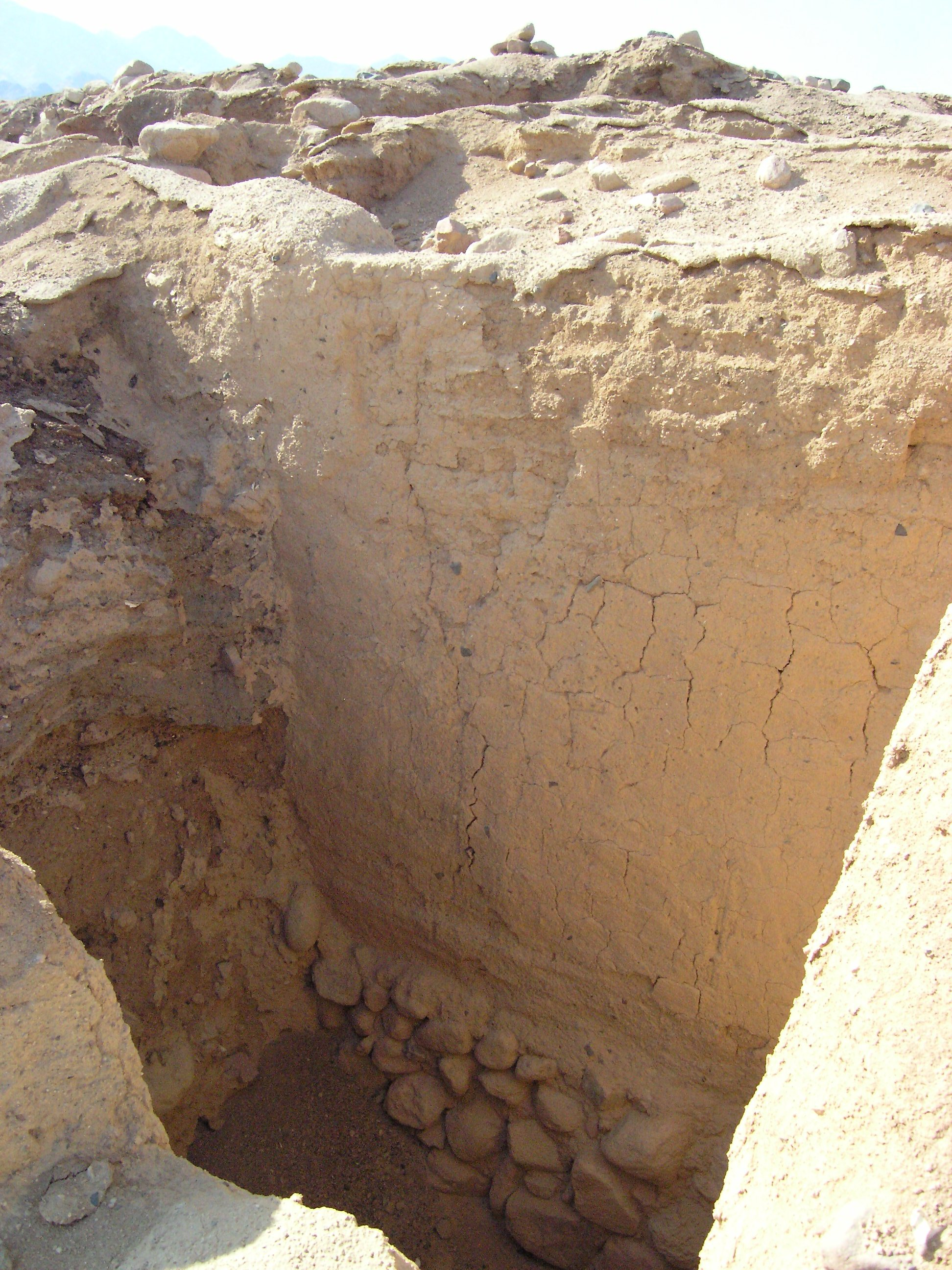 Ausgrabungen auf dem Tall Hujayrat al-Ghuzlan, Jordanien; hoch anstehende Lehmziegelmauer mit Steinfundament.